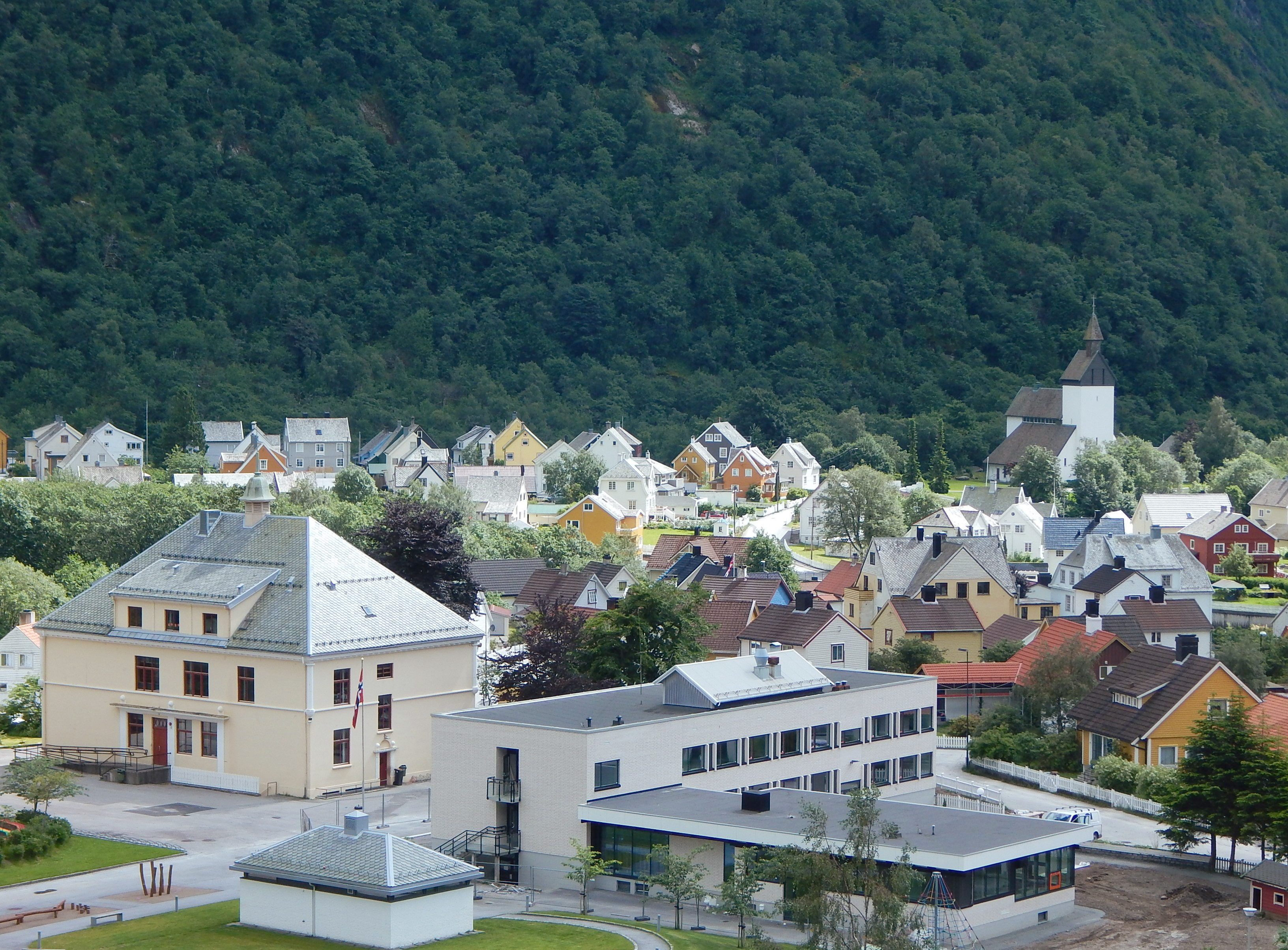 Høyanger med kirken